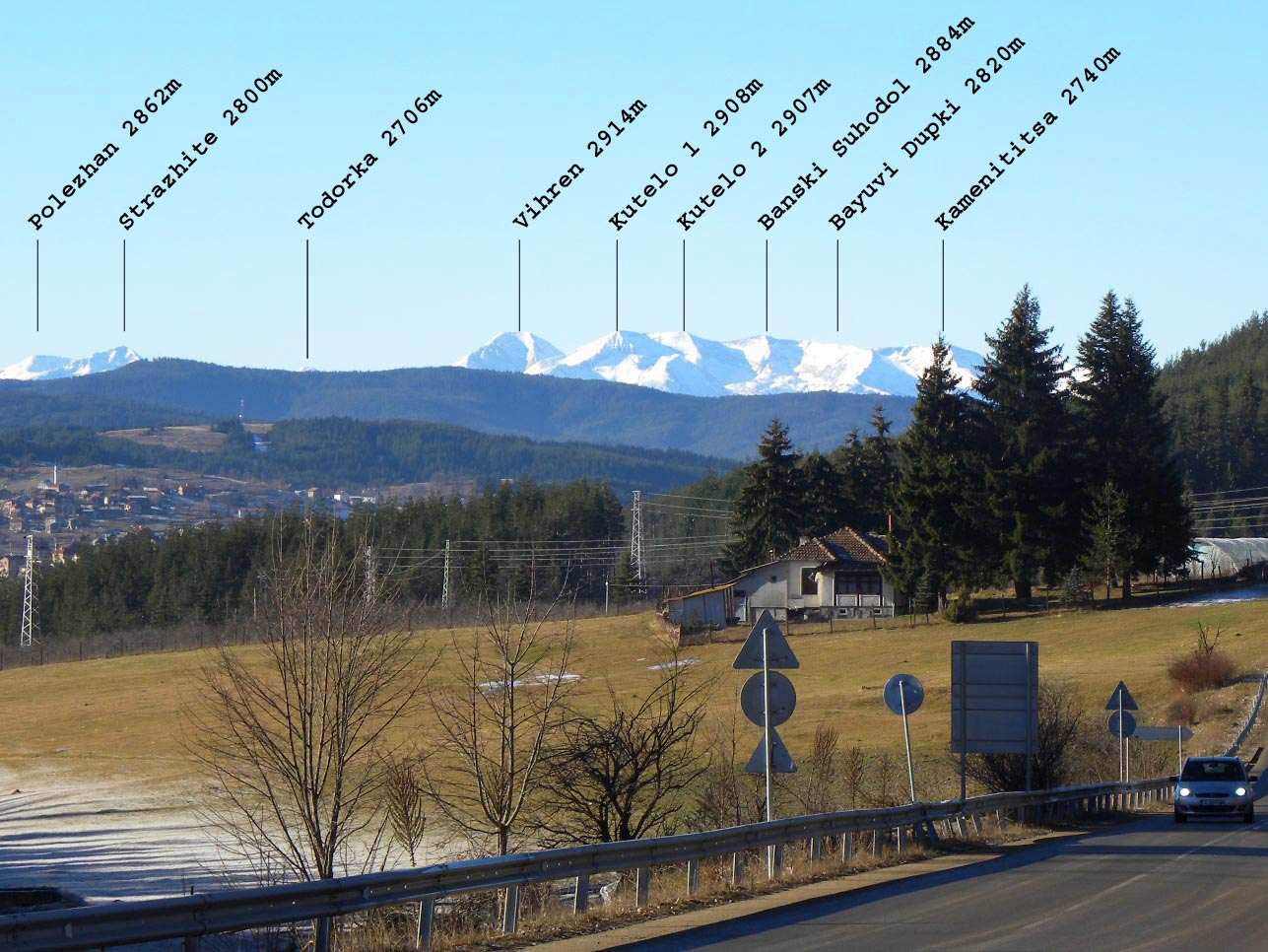 Höchste Gipfel der Pirin Gebirge in Bulgarien